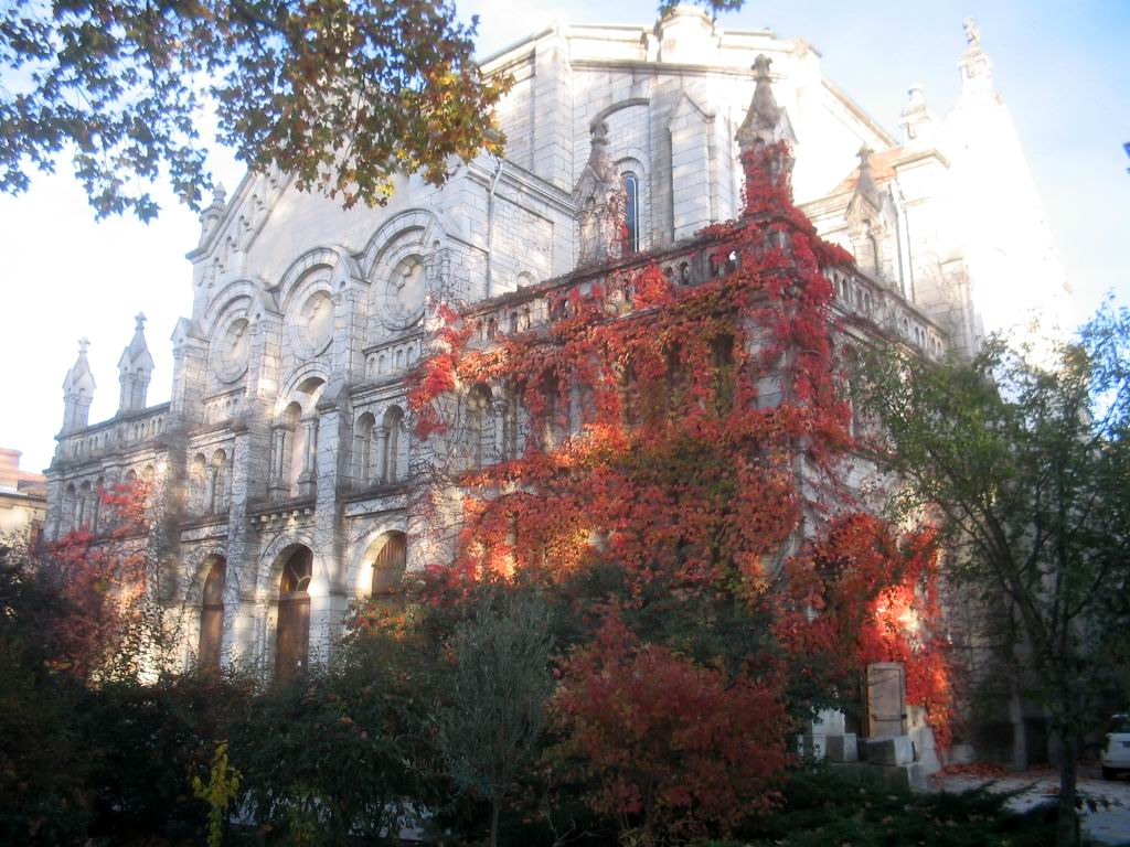 Fanjeaux (Aude, Languedoc-Roussillon, France) - Monastère de Prouille.